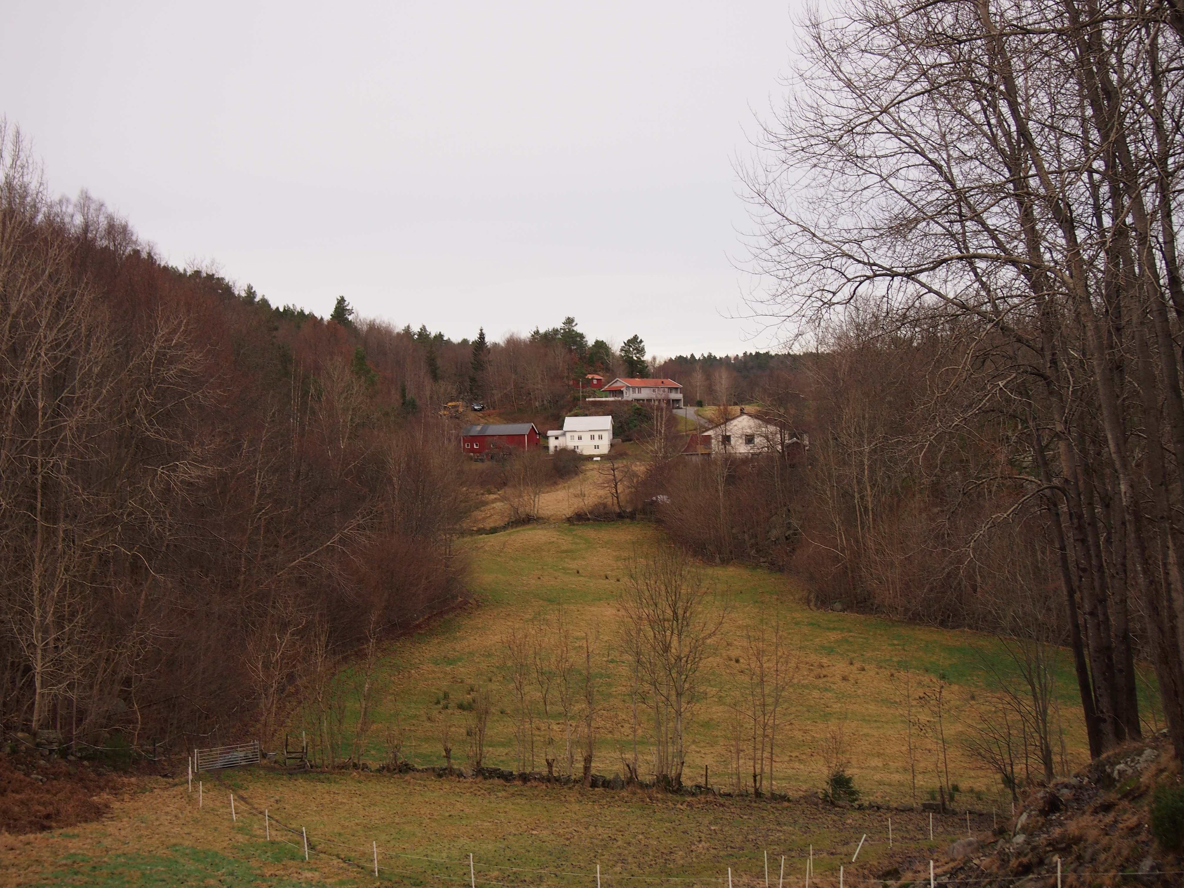 Trøe